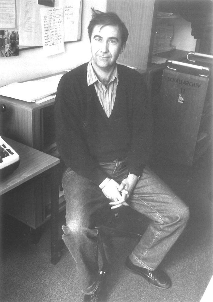 Der Featureredakteur, Autor und Regisseur Wolfgang Bauernfeind in einer Aufnahme des Berliner Fotografen Werner Bethsold.